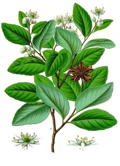 Seifenbaum. A blühender u. fruchtender Zweig, natürl. Grösse; 1 Blüthe, vergrössert; 2 dieselbe im Längsschnitt, desgl. auf Grund des in Engler u. Prantl befindlichen Baillon'schen Holzschnittes.